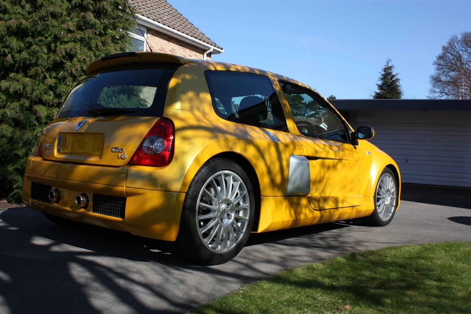 2006 RenaultSport Clio V6 255